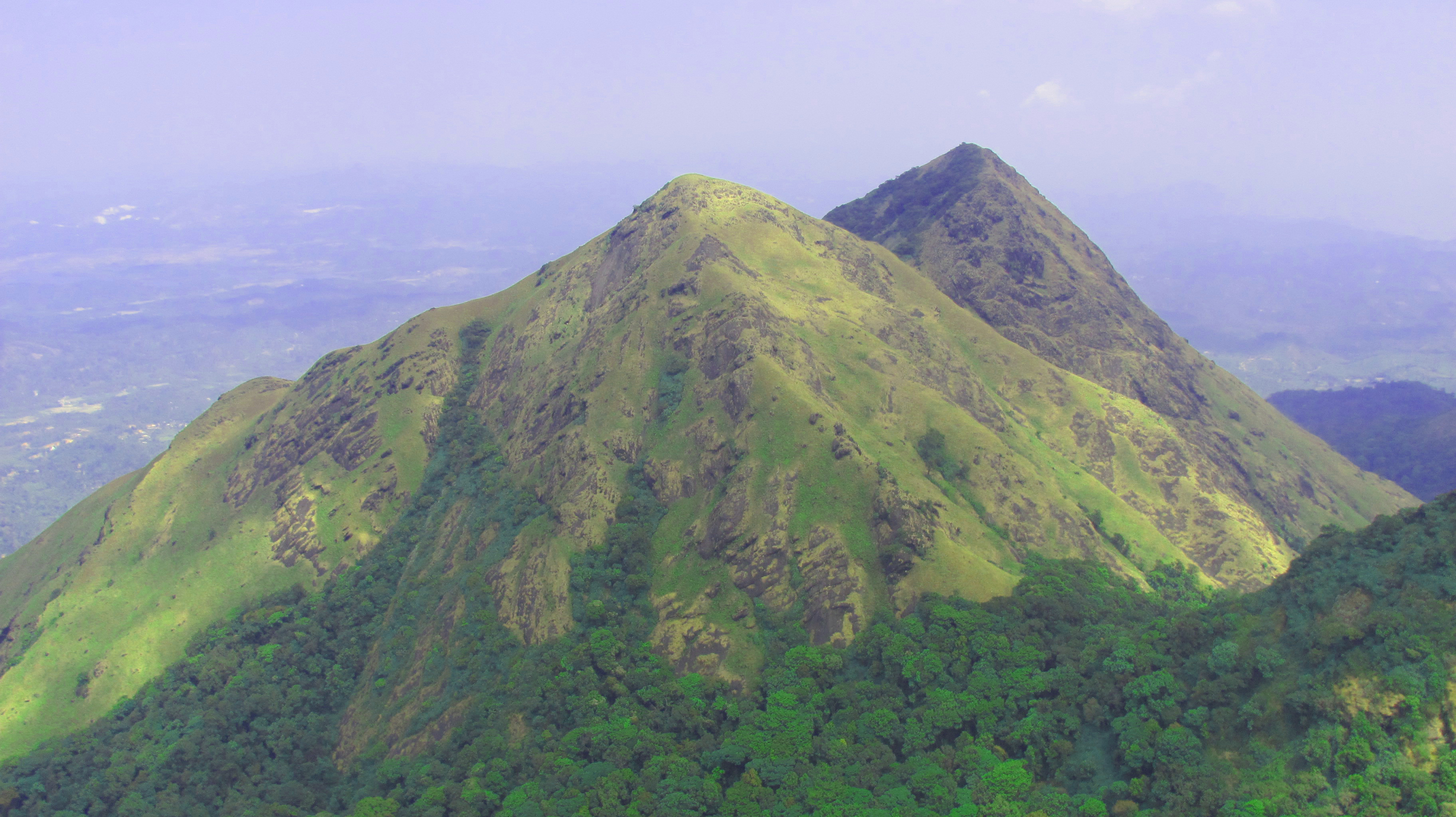 ചെ‌മ്പ്ര കൊടുമുടിയുടെ ചിത്രം